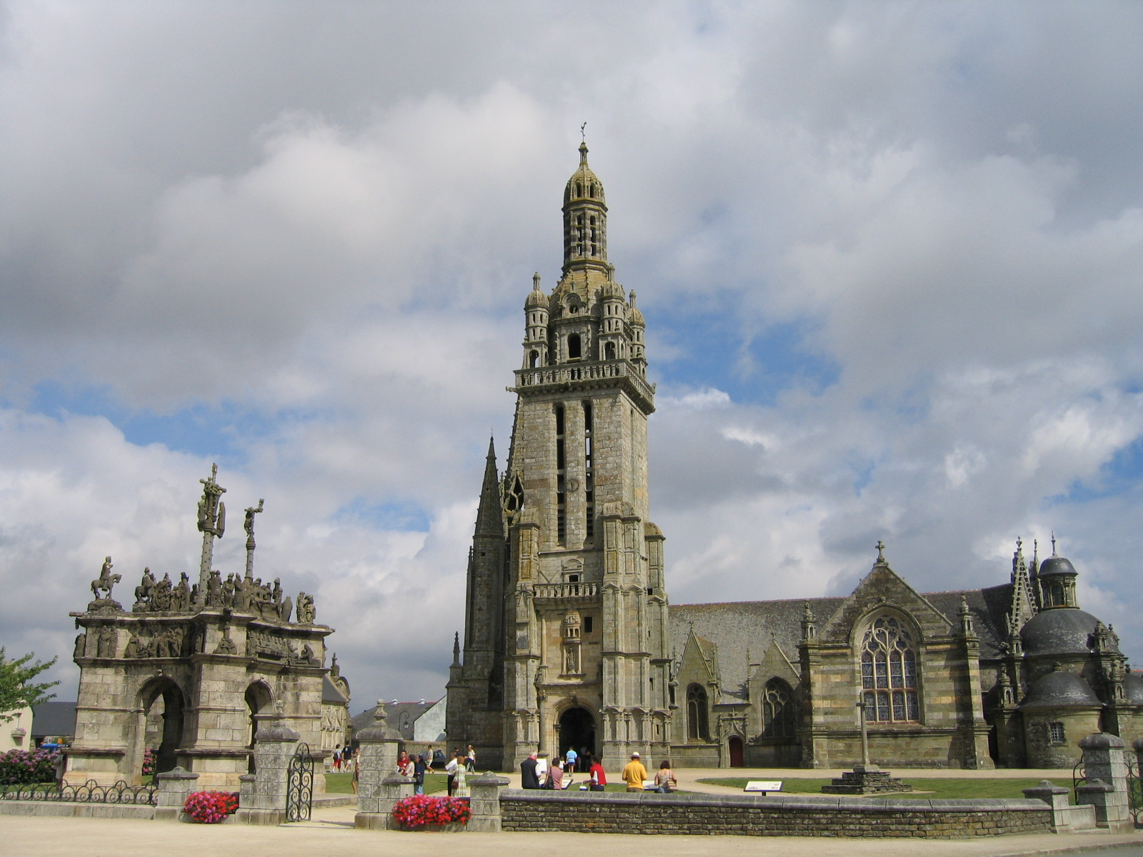 Enclos paroissial, commune de Pleyben, région Bretagne